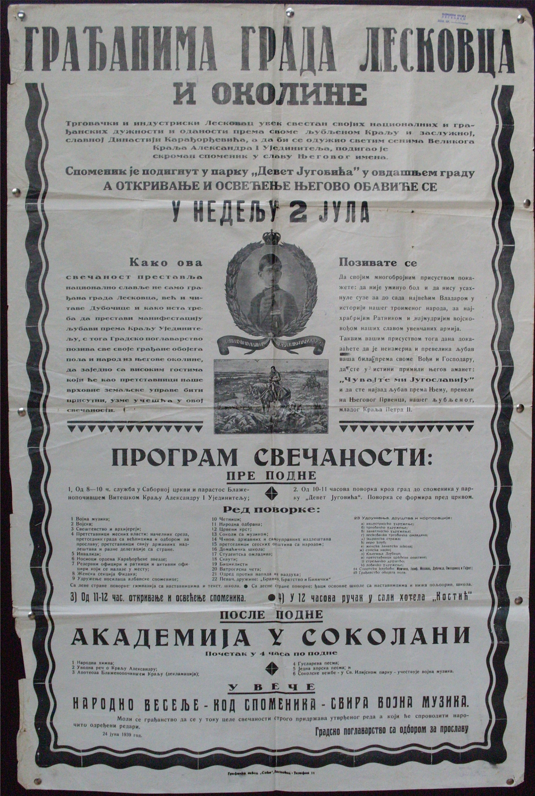 Srpski (latinica): Plakat GRAĐANIMA GRADA LESKOVCA I OKOLINE kojim se pozivaju na otkrivanje i osvećenje spomenika kralju Aleksandru u parku Devet Jugovića, 2. jula 1939. godine.